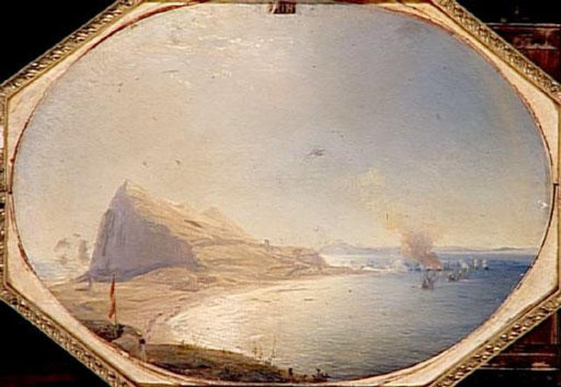 Expedition de Coetlogon a Gibraltar 1693. Huile sur toile de Théodore Gudin, commandée par Louis-Philippe pour le musée historique de Versailles en 1839